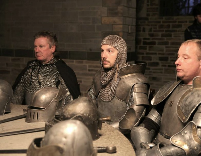 photo prise pendant le tournage de la série